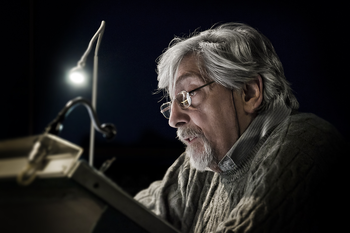 Ritratto di Dario Penne presso studi Technicolor Roma.